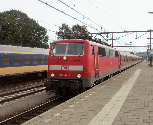 Maas-Wupper-Express (Line RE13) in Venlo